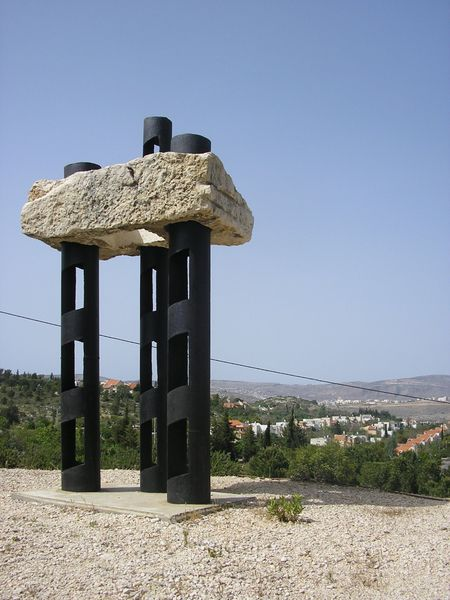 יובלים. מבט מגן הפסלים בכניסה ליישוב. צולם על ידי